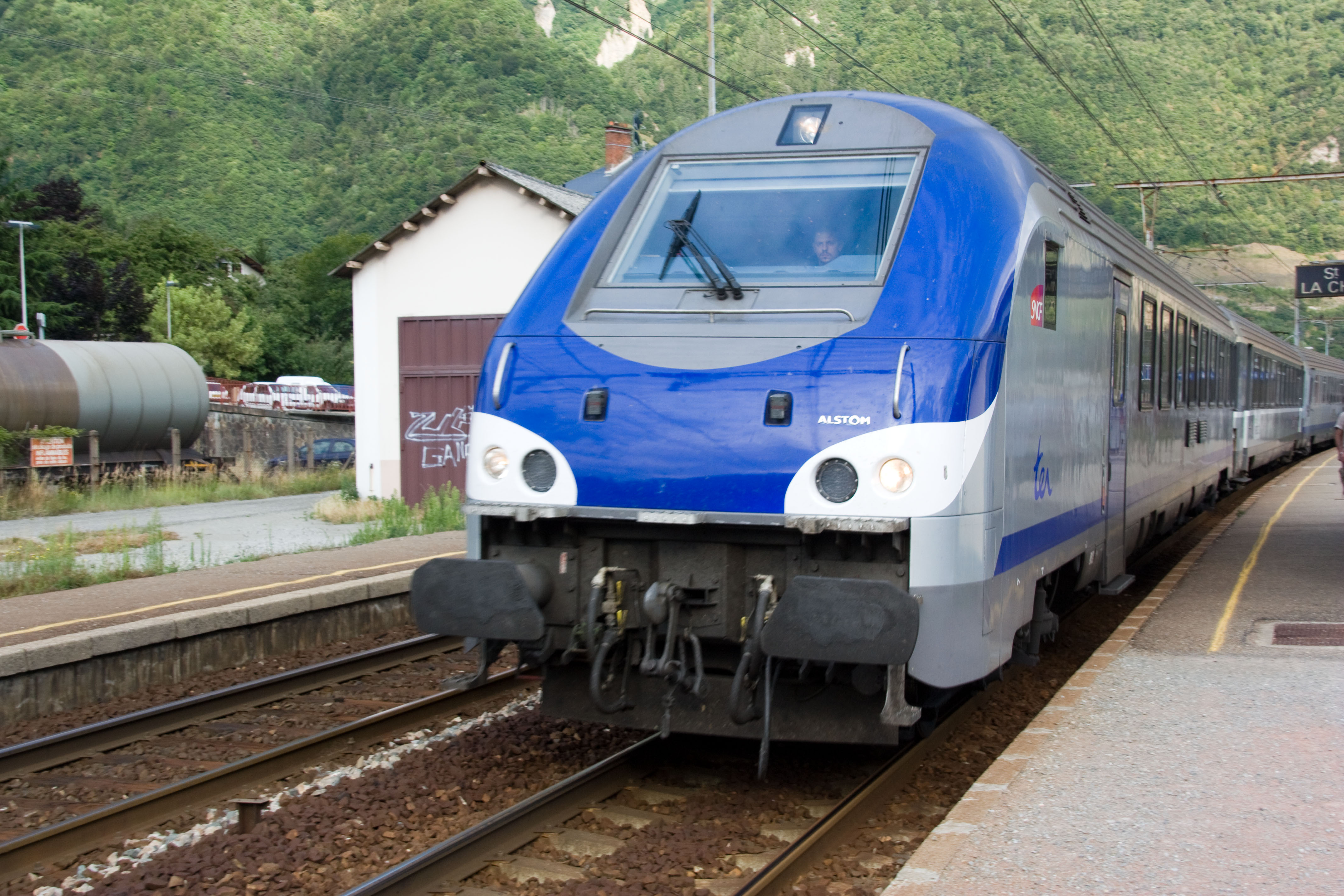 Saint-Avre, Savoie, France TER pour Lyon